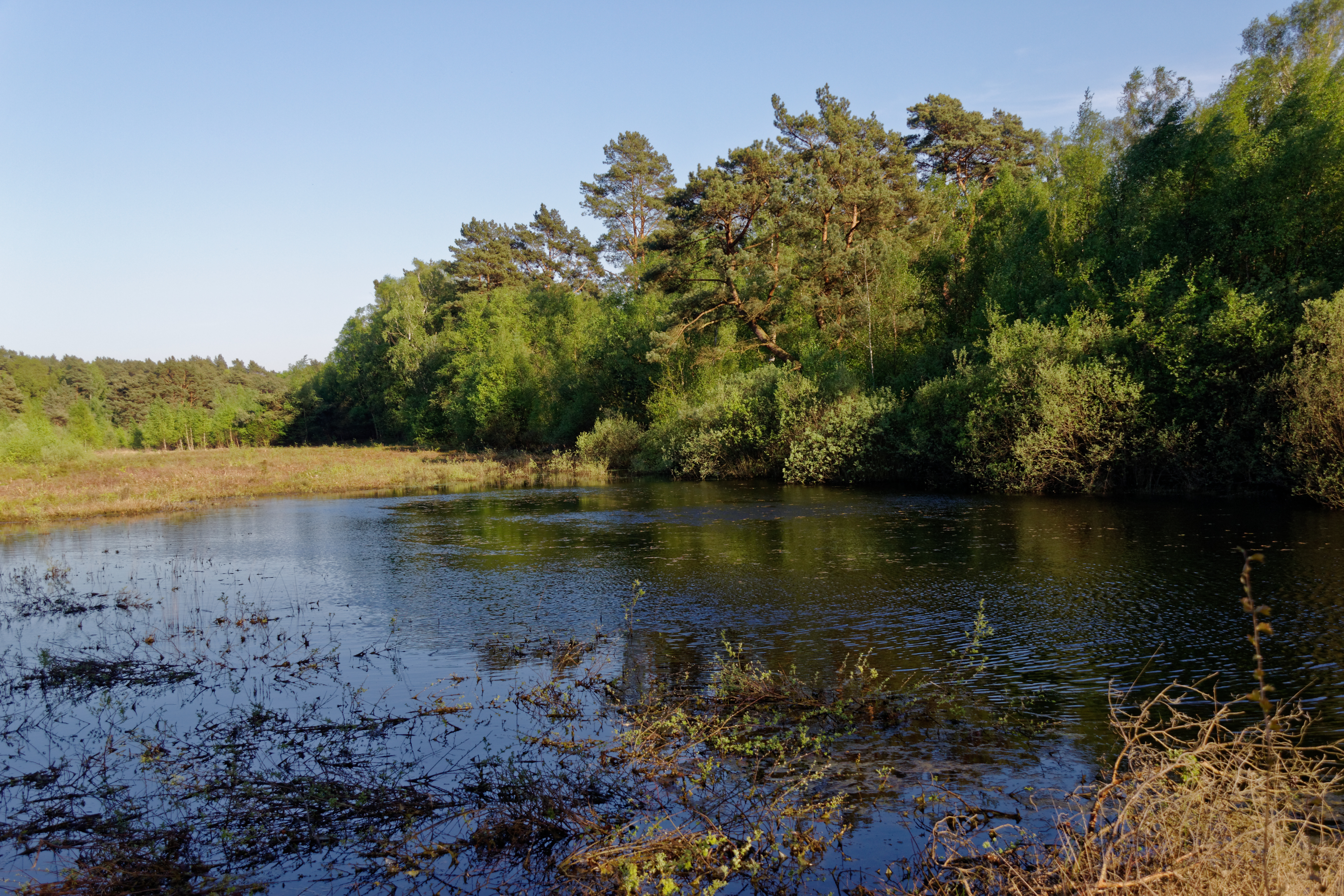 Hamburg-Rissen, Schnaakenmoor, FFH-Gebiet, Tümpel